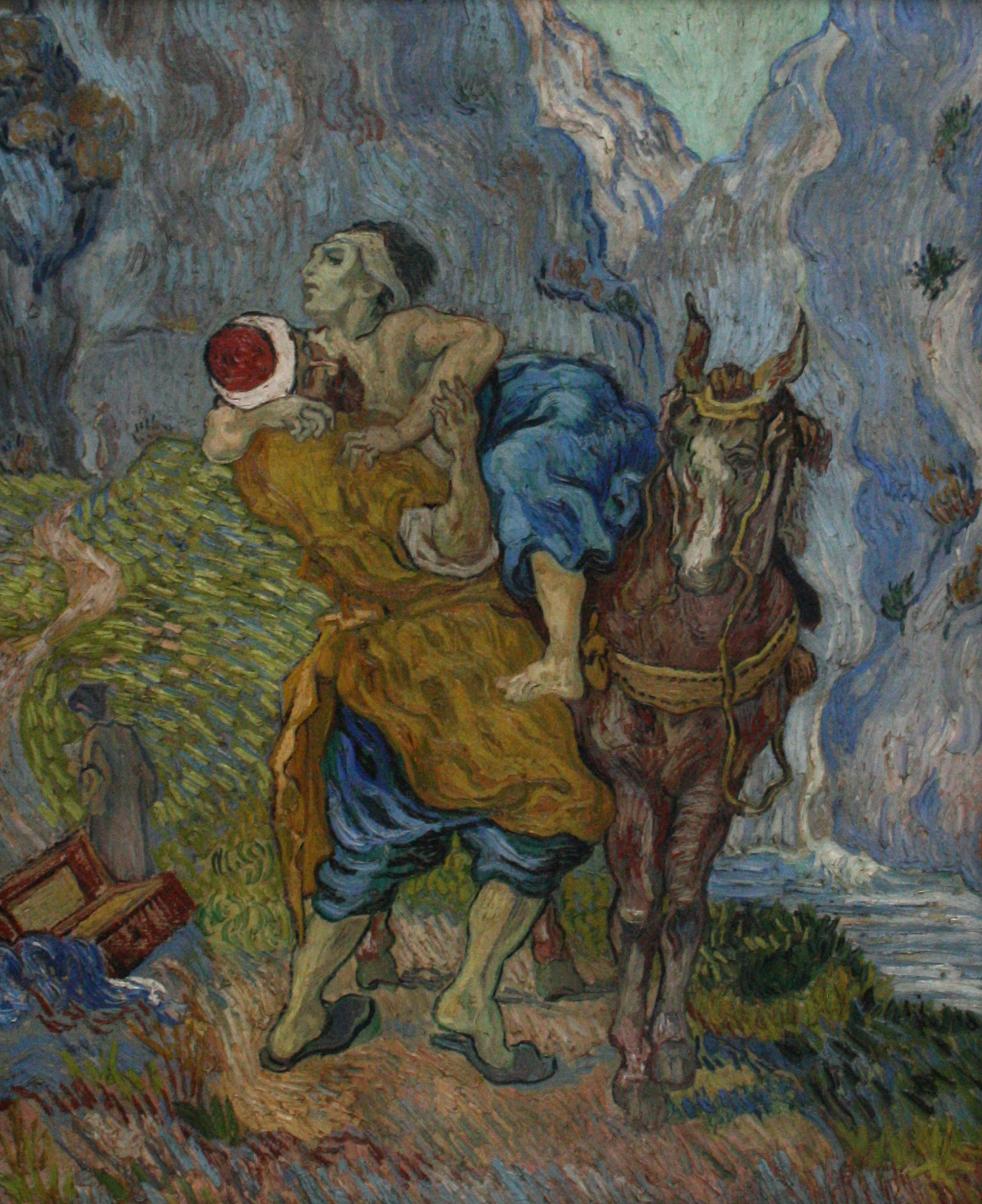 The good samaritan (after Delacroix) nl: De barmhartige samaritaan (naar Delacroix)